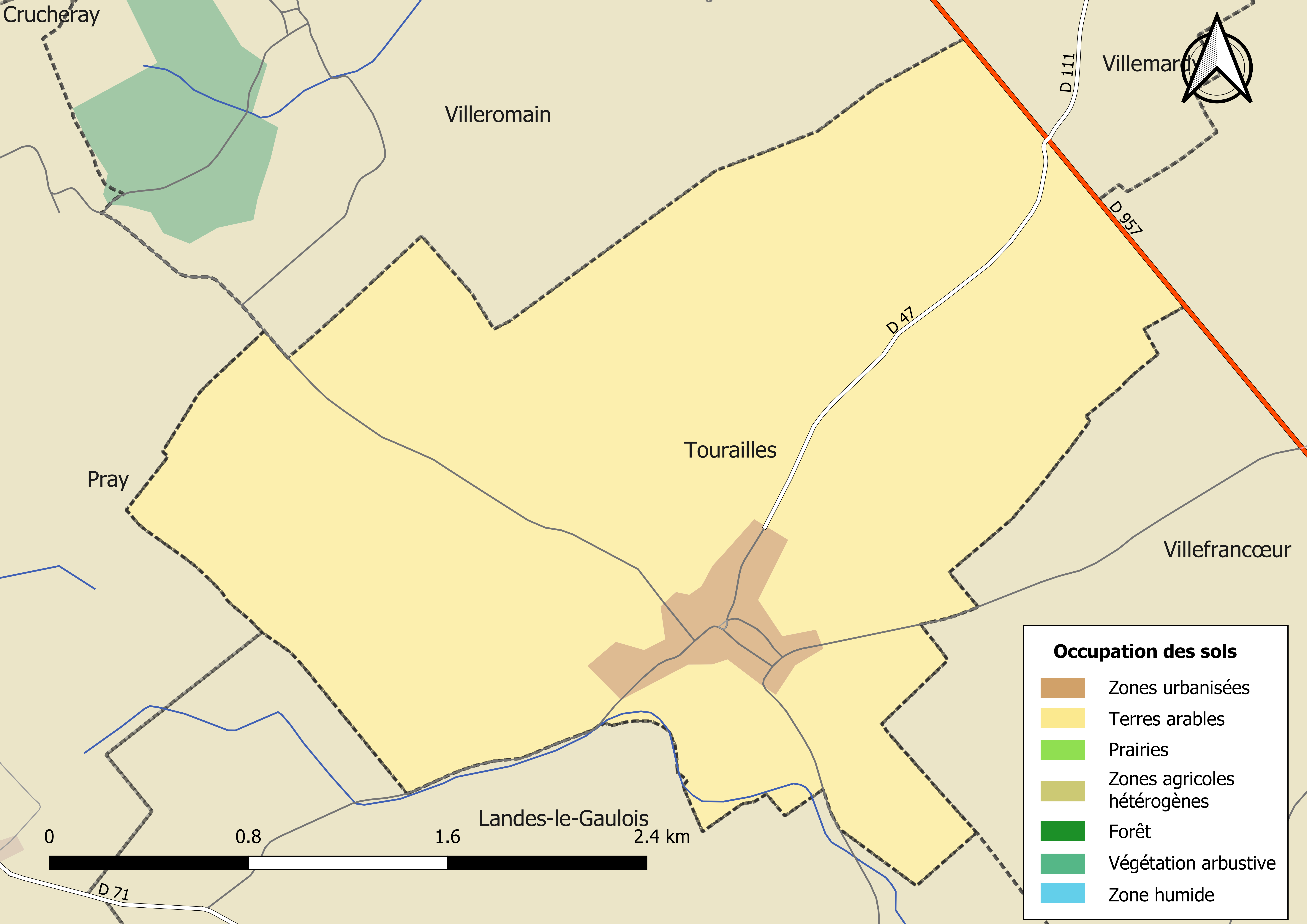 Carte des infrastructures et de l’occupation des sols en 2018 de la commune de Tourailles (France).